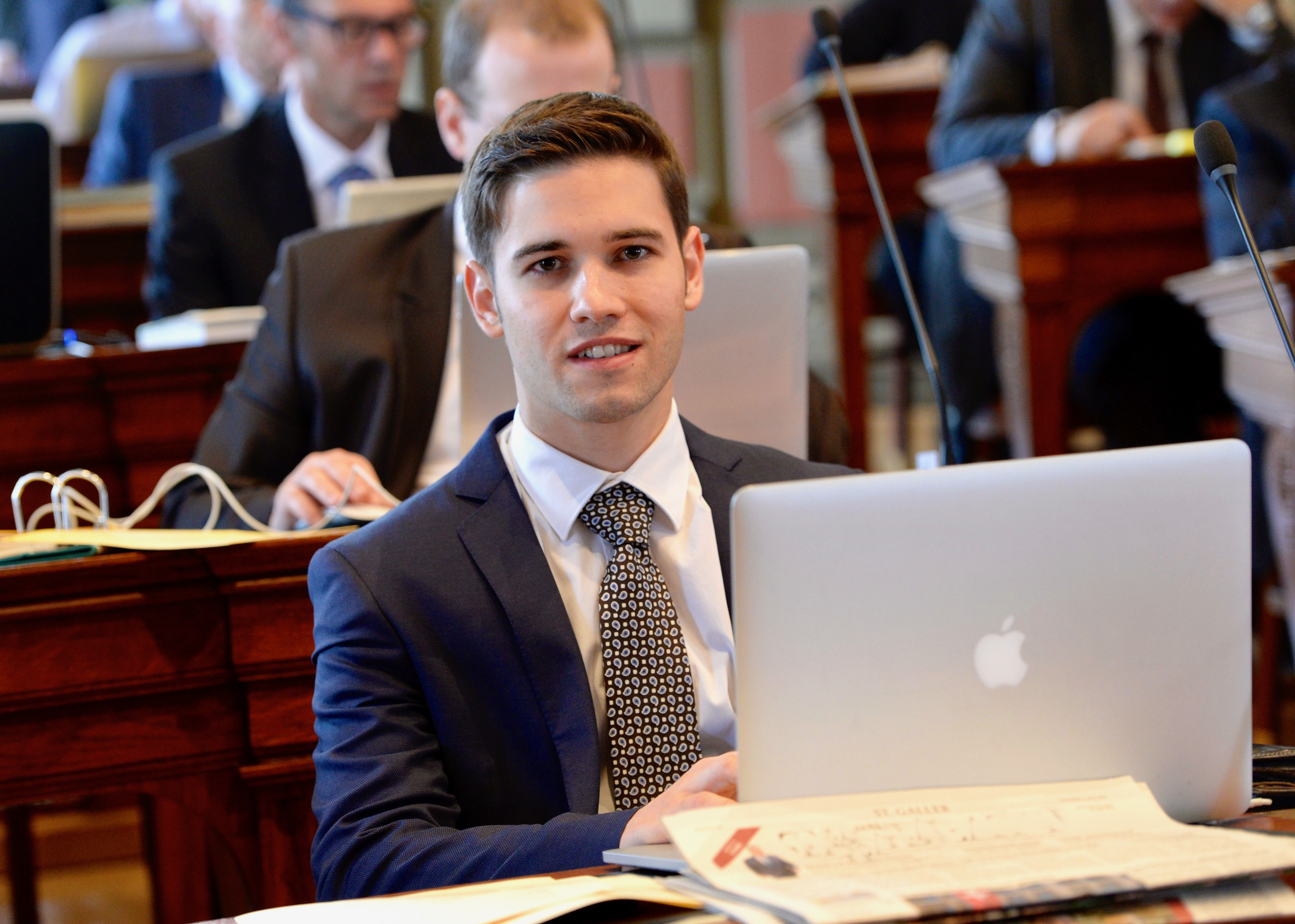 Aufnahme von Sascha Schmid aus der Juni-Session des St. Galler Kantonsrates.